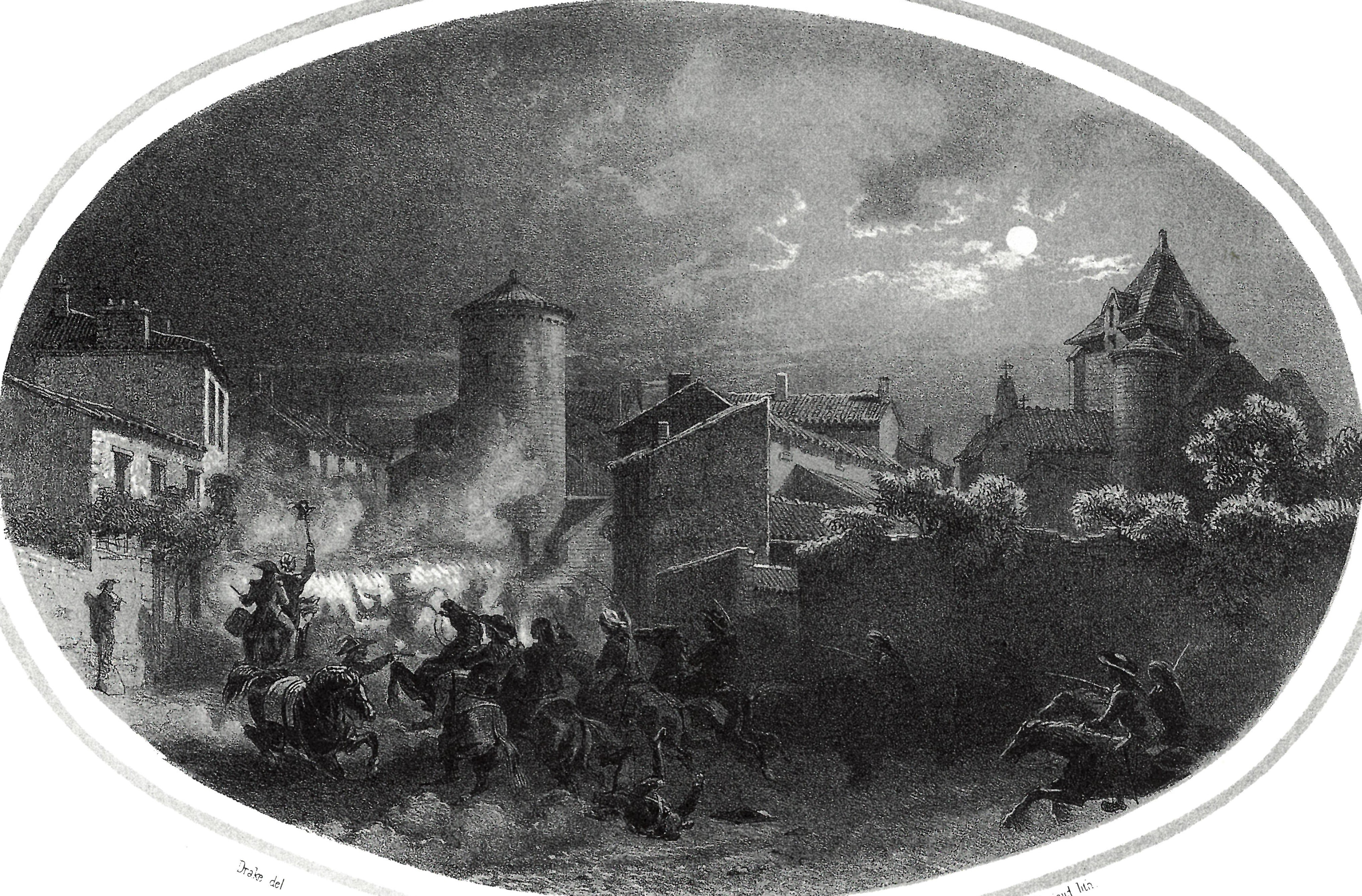 Bataille de Saint-Fulgent 1793